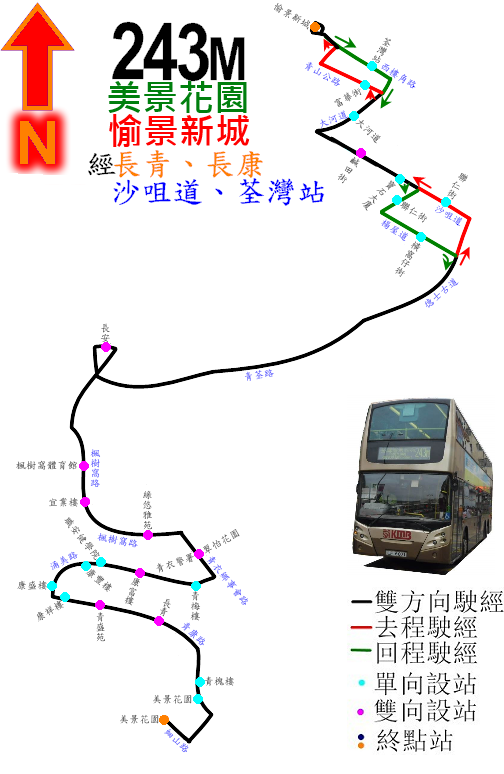 中文（香港）: 九巴243M線的走線圖